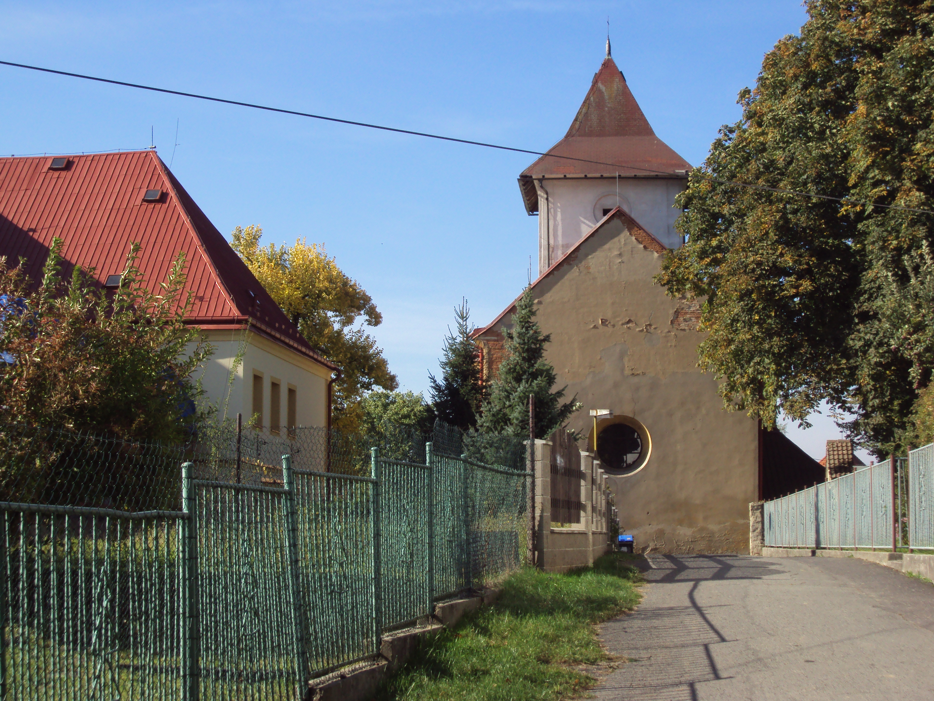 Kostel z boku